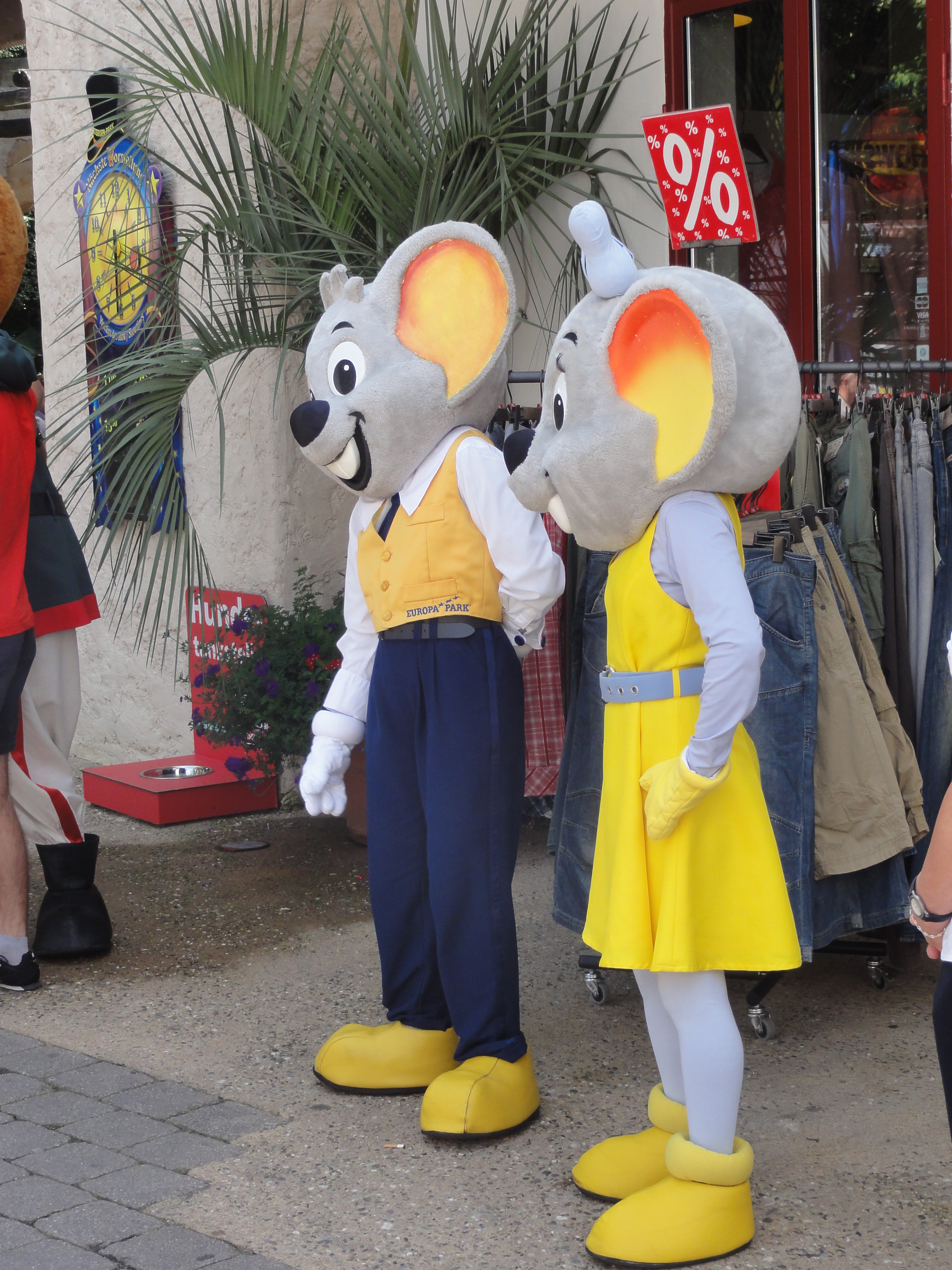 Euromaus & Euromausie, Europa-Park, Rust, Bade-Wurtemberg, Allemagne.